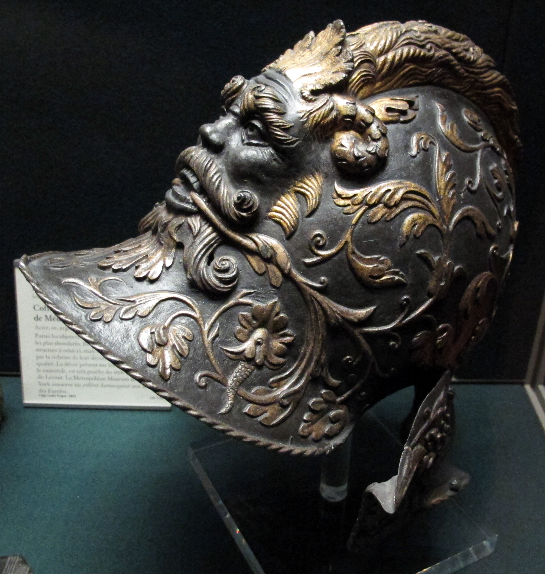 Arte decorativa, Louvre, Parigi